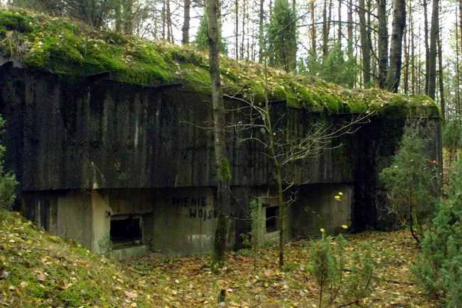 Linia Mołotowa - bunkier.